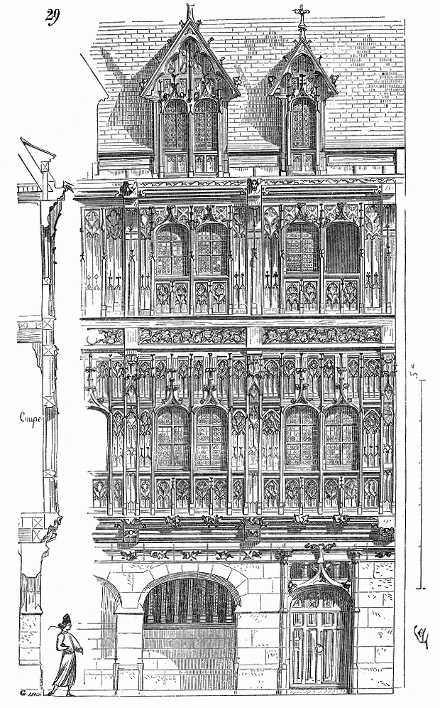 ... La figure 29, qui reproduit une portion d'habitation de l'abbaye de Saint-Amand, à Rouen, laisse voir au-dessus d'un rez-de-chaussée en maçonnerie deux étages de pans de bois entièrement garnis, à l'extérieur, de panneaux de menuiserie sculptés. Lorsqu'un peu plus tard, avec la Renaissance, on en revint aux constructions de pierre, cette habitude s'était si bien conservée que l'on bâtit encore un grand nombre de maisons de bois, mais dans lesquelles cependant on trouve des formes de pilastres et de bandeaux qui n'appartiennent point au système de construction en charpente ...